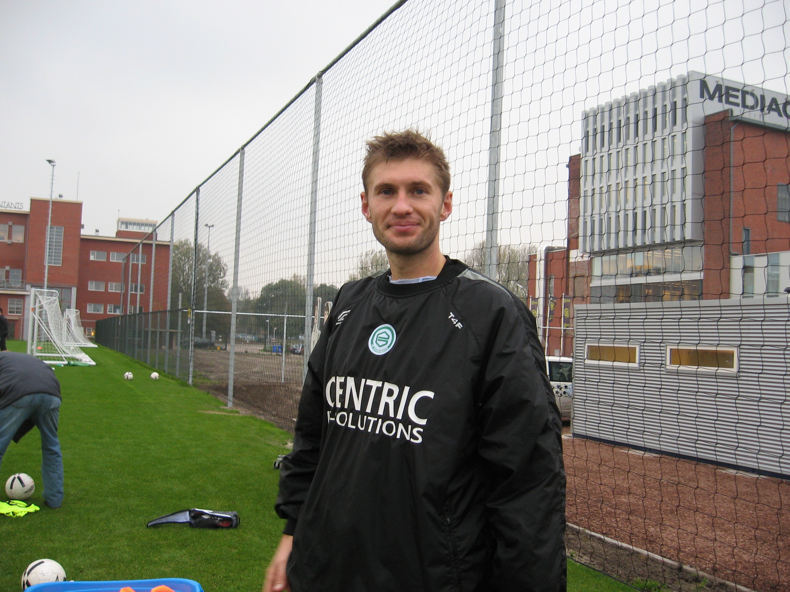 Description FC Groningen-speler Evgeniy Levchenko Date8 November 2006SourceOwn workAuthorKevsterPermission (Reusing this file) Vrijgegeven onder GFDL. FC Groningen-speler Evgeniy Levchenko